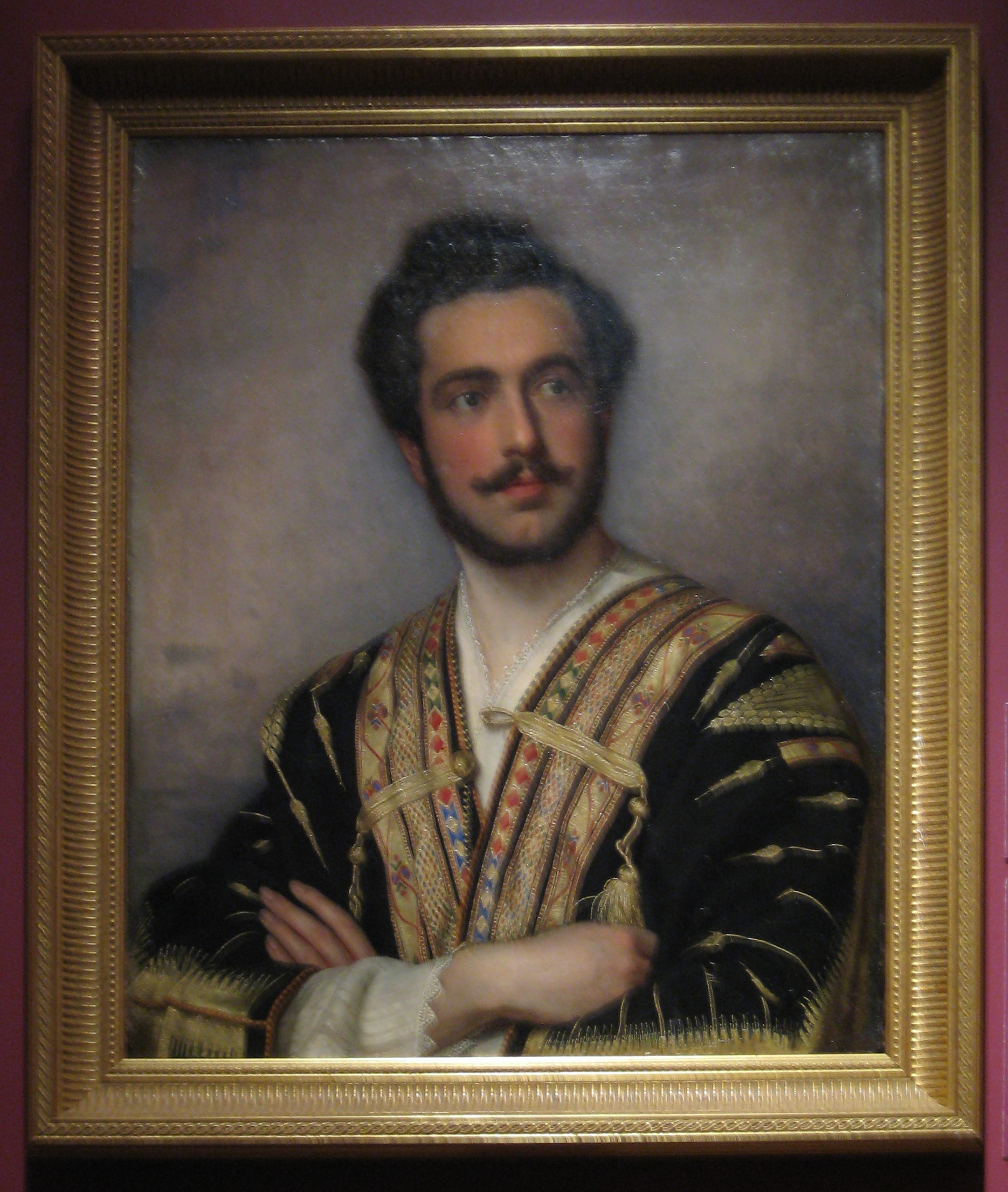 Выставка "Национальная портретная галерея", 2012.